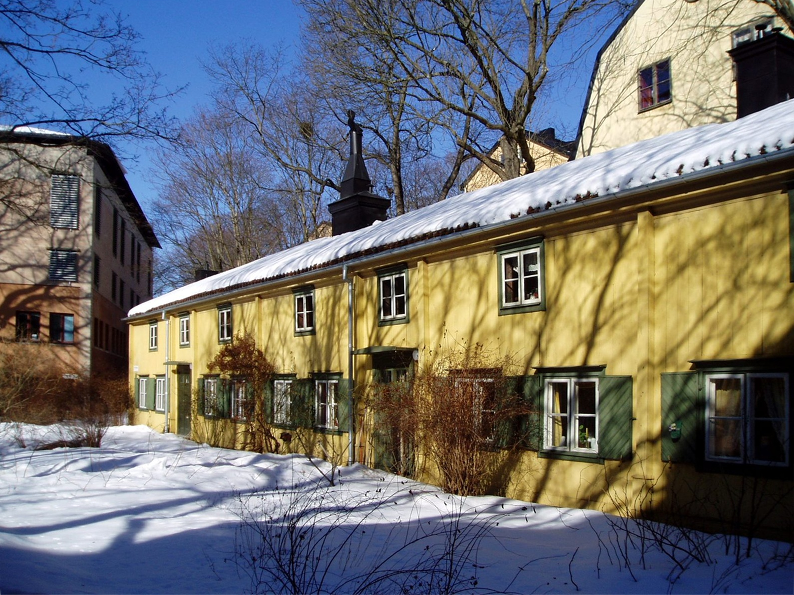 Gamla hus vid Färgargårdstorget, Södermalm, Stockholm